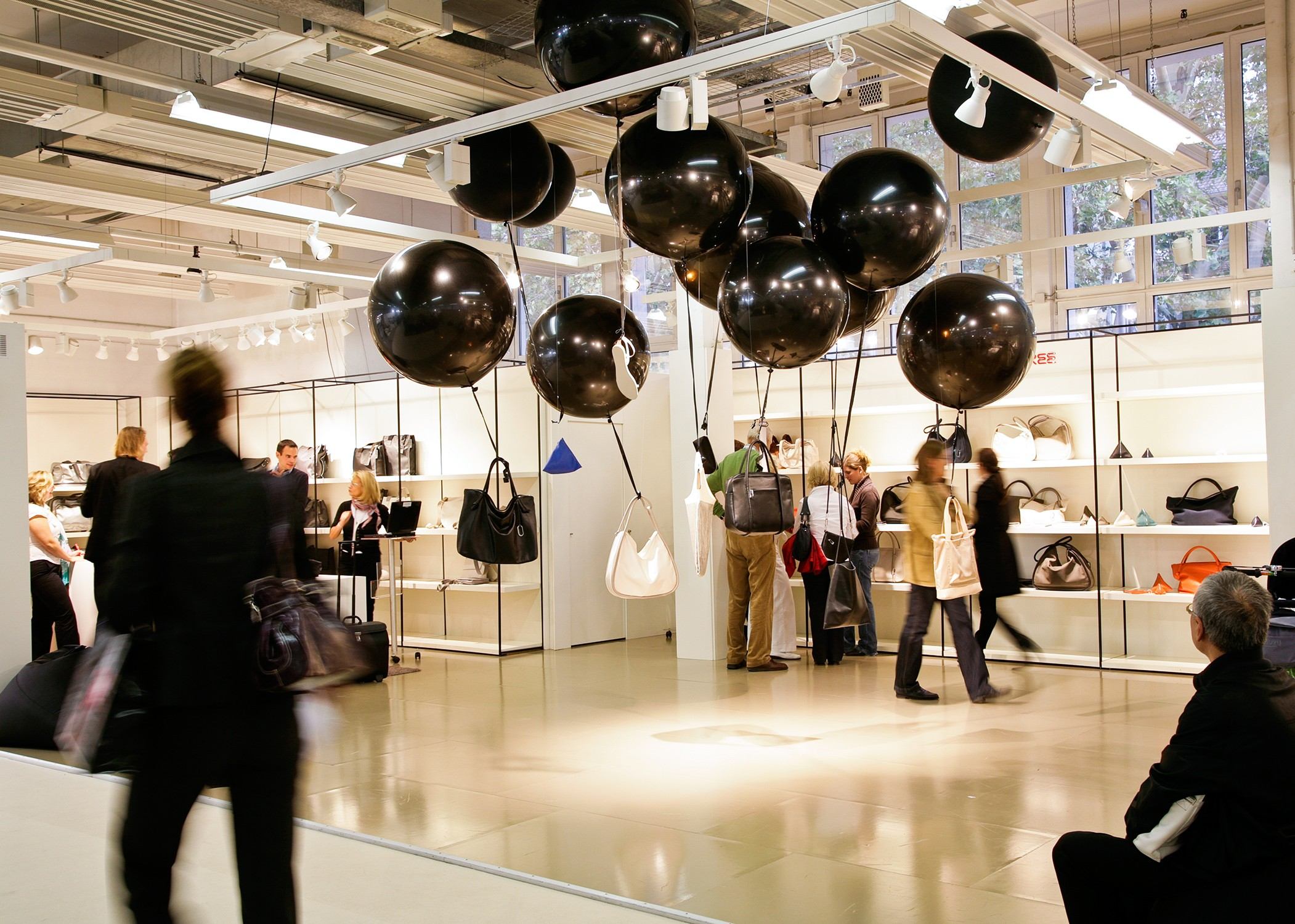 Messeveranstaltung in der Messe Offenbach am Main